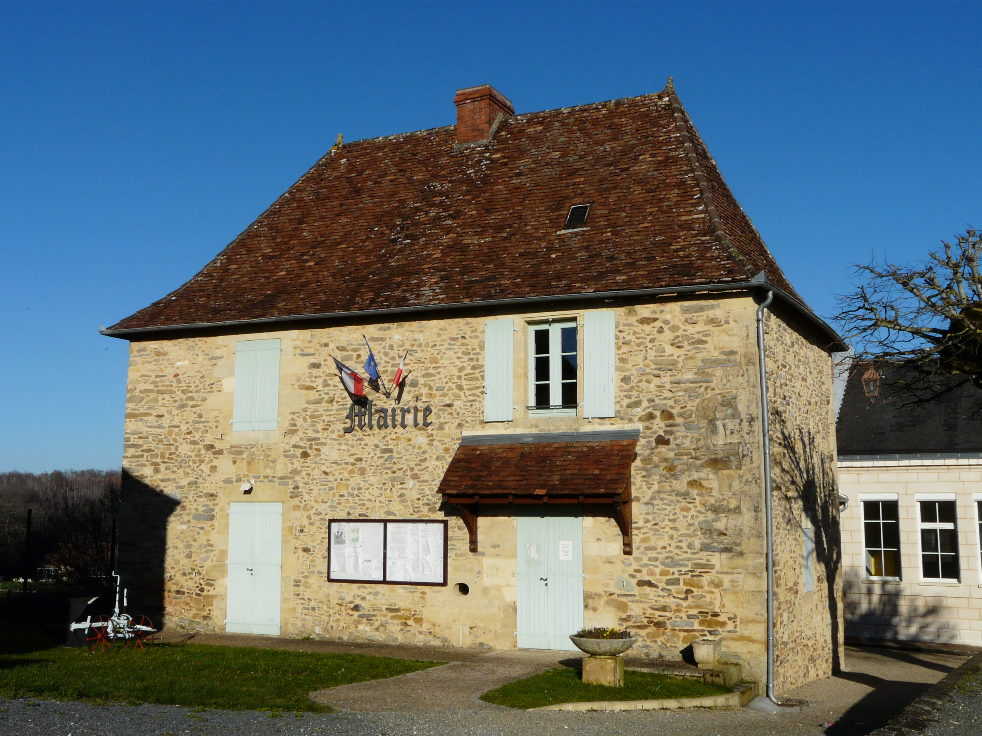 La mairie de Clermont-d'Excideuil , Dordogne, France.